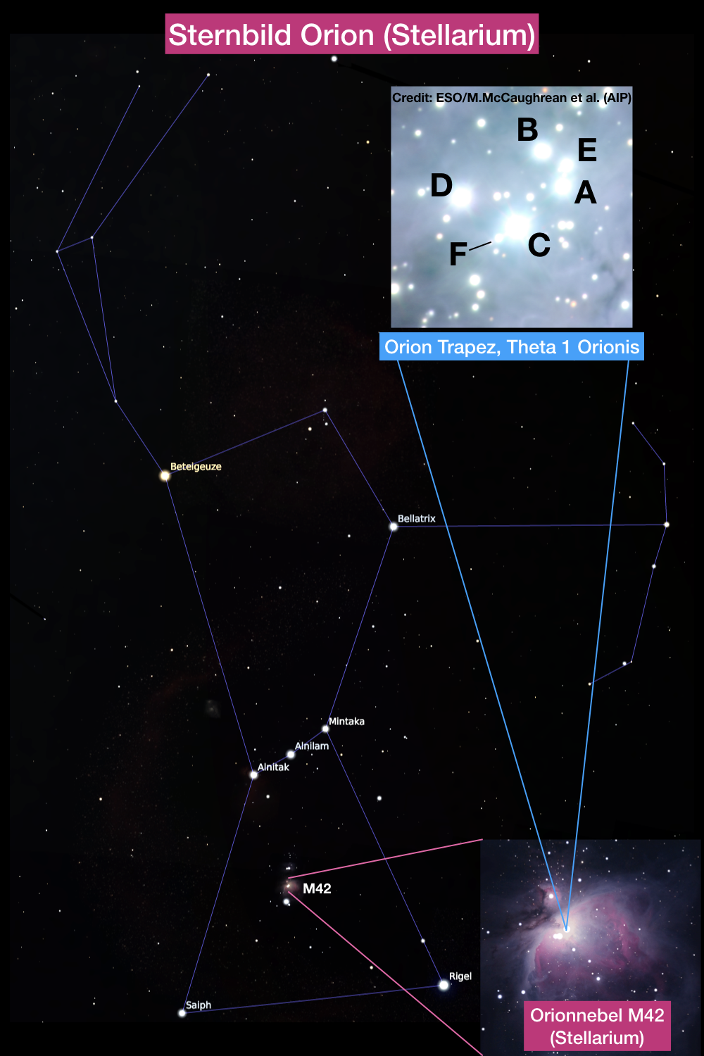 Orion Sternbild mit Orionnebel M42 und Trapezsternen in M42. Das Hauptbild wurde mit Stellarium erzeugt. Ebenso der rechts unten vergrößerte Ausschnitt des Orionnebels M42. Die Trapezsterne in M42 sind oben rechts dargestellt und die hellsten Trapezsterne mit A, B, C, D, E, F bezeichnet. Die VLT-Isaac Aufnahme der Trapezsterne stammt von ESO/Mark McCaughrean.